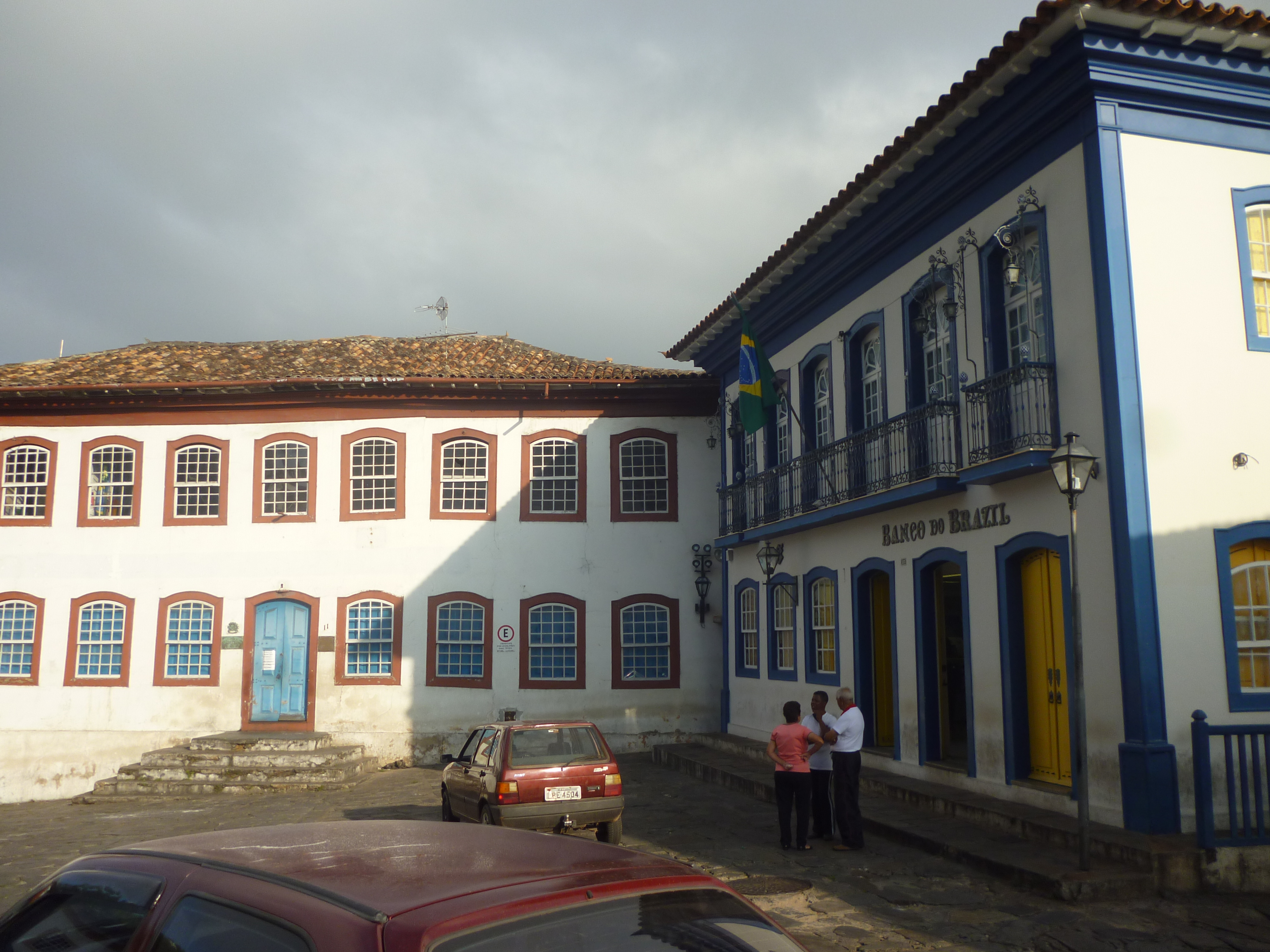 Diamantina MG Brasil - Casarão Colonial da Prefeitura